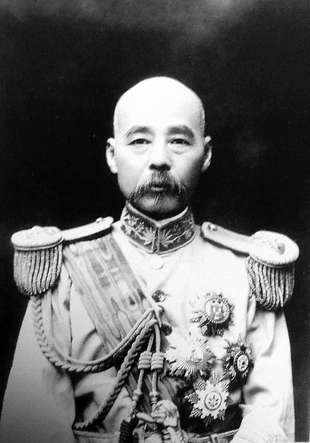 冯国璋